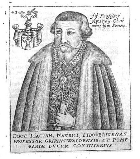 Bildnis des Greifswalder Professors Joachim Mauritius